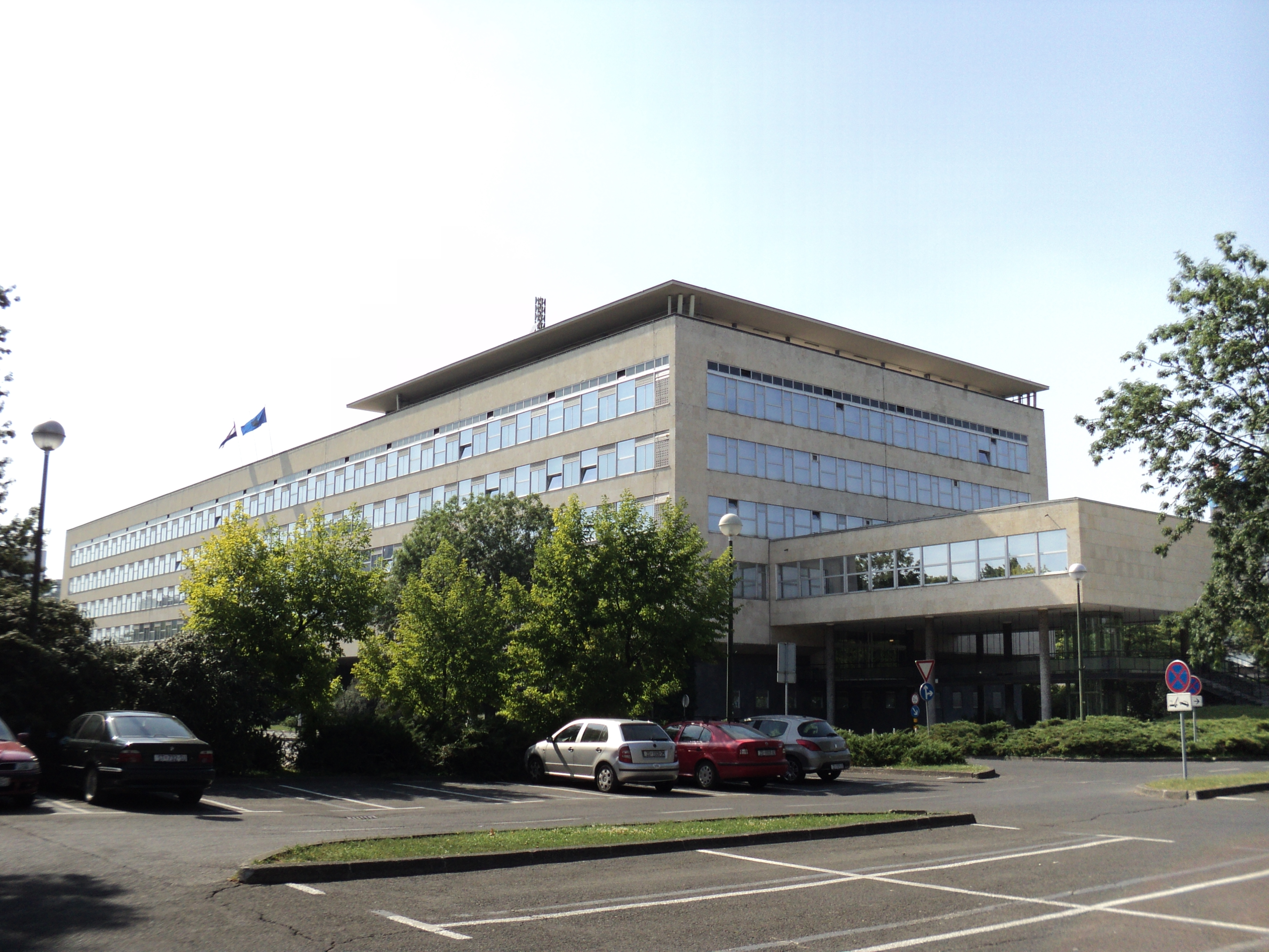 Zgrada Gradskog poglavarstva, Vukovarska ulica, Zagreb.